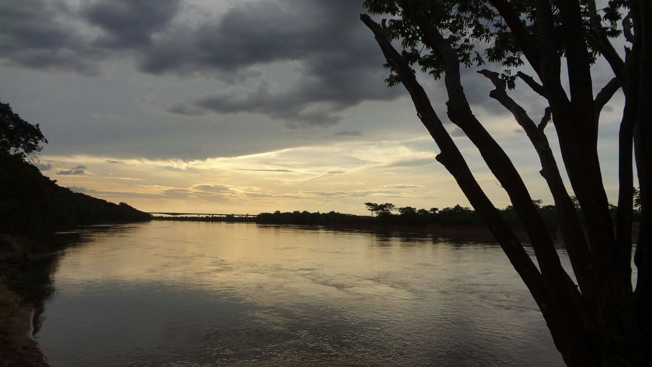 O rio Tocantins é um rio brasileiro que nasce no Distrito Federal na Estação Ecológica de Águas Emendadas, passando logo após pelos estados de Goiás, Tocantins, Maranhão e Pará, até a sua foz no golfo Amazônico - próximo a Belém, onde se localiza a ilha de Marajó. Após a união do rio das Almas, rio Maranhão e rio Paranã, entre os municípios de Paranã e São Salvador do Tocantins (ambos localizados no estado do Tocantins), o rio passa a ser chamado definitivamente de rio Tocantins. Durante a época das cheias, seu trecho navegável é de aproximadamente 2 000 km, entre as cidades de Belém - Pará e Lajeado - Tocantins. O rio Tocantins é o segundo maior rio totalmente brasileiro (perde apenas para o rio São Francisco), e também pode ser chamado de Tocantins-Araguaia, após juntar-se ao rio Araguaia na região do "Bico do Papagaio", que fica localizada entre o Tocantins, o Maranhão e o Pará. É no vale do médio e baixo rio Tocantins que se encontrava a maior concentração de castanheiras da Amazônia.